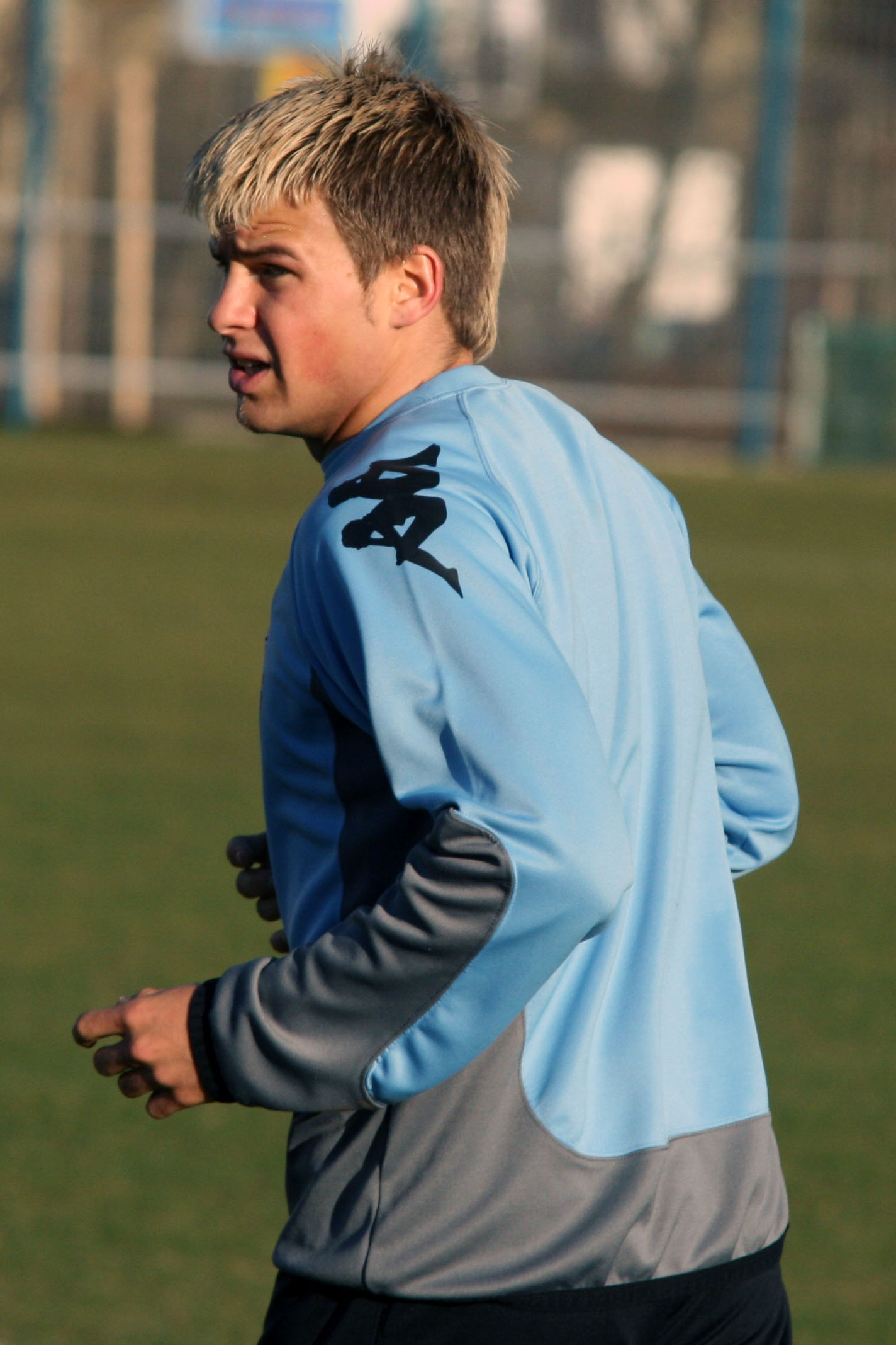 Björn Ziegenbein, player of TSV 1860 München, training, 20.01.2007, Grünwalder Str., Munich